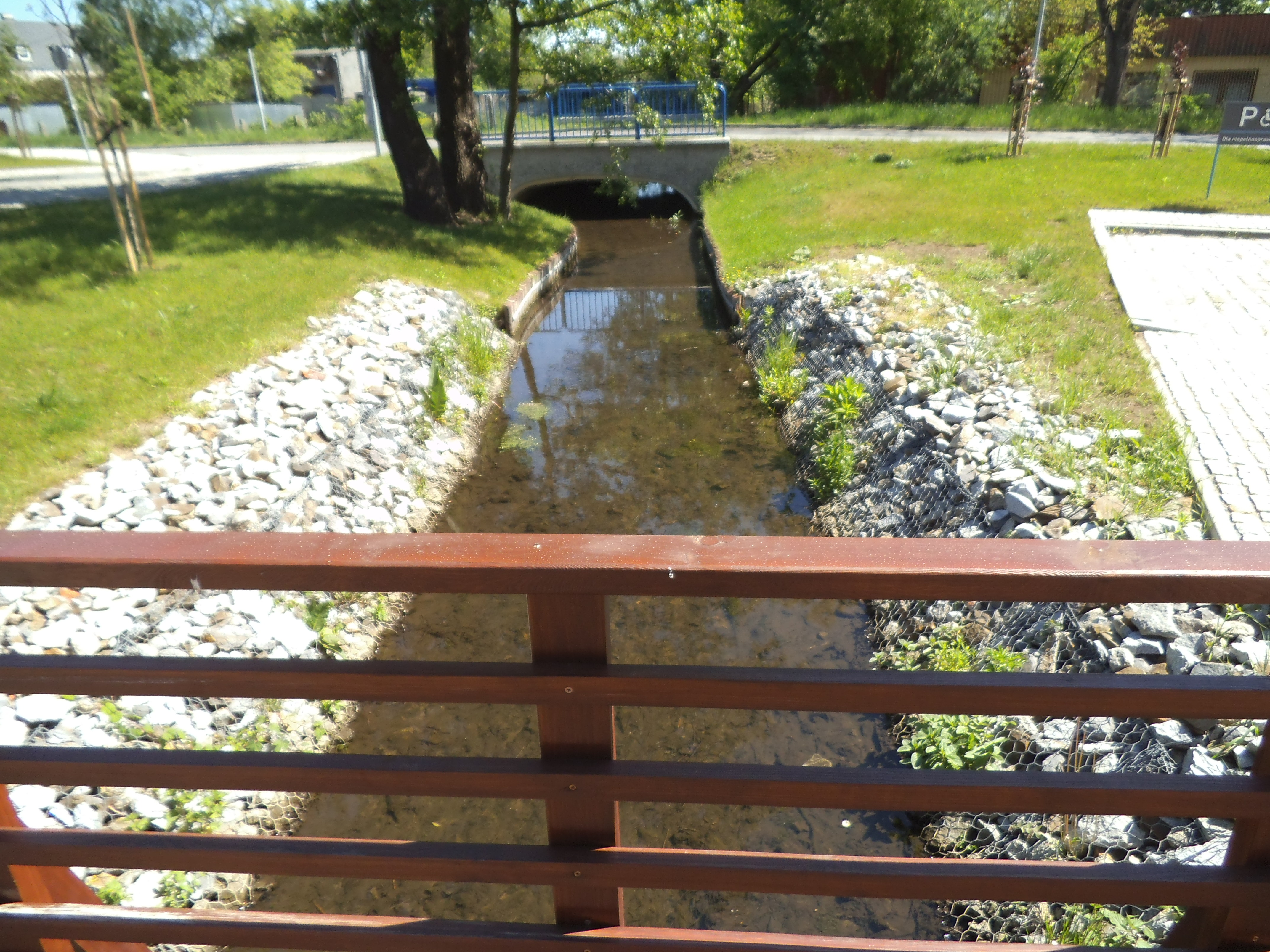 Struga Toruńska - fragment przy Centrum Nowoczesności Młyn Wiedzy w Toruniu2